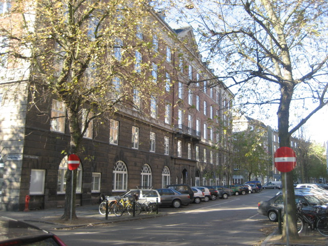 Sankt Thomas Allé, Frederiksberg, Denmark